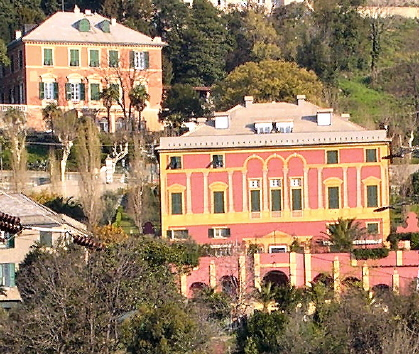 Villa Clorinda (Murta - Bolzaneto - Genova)